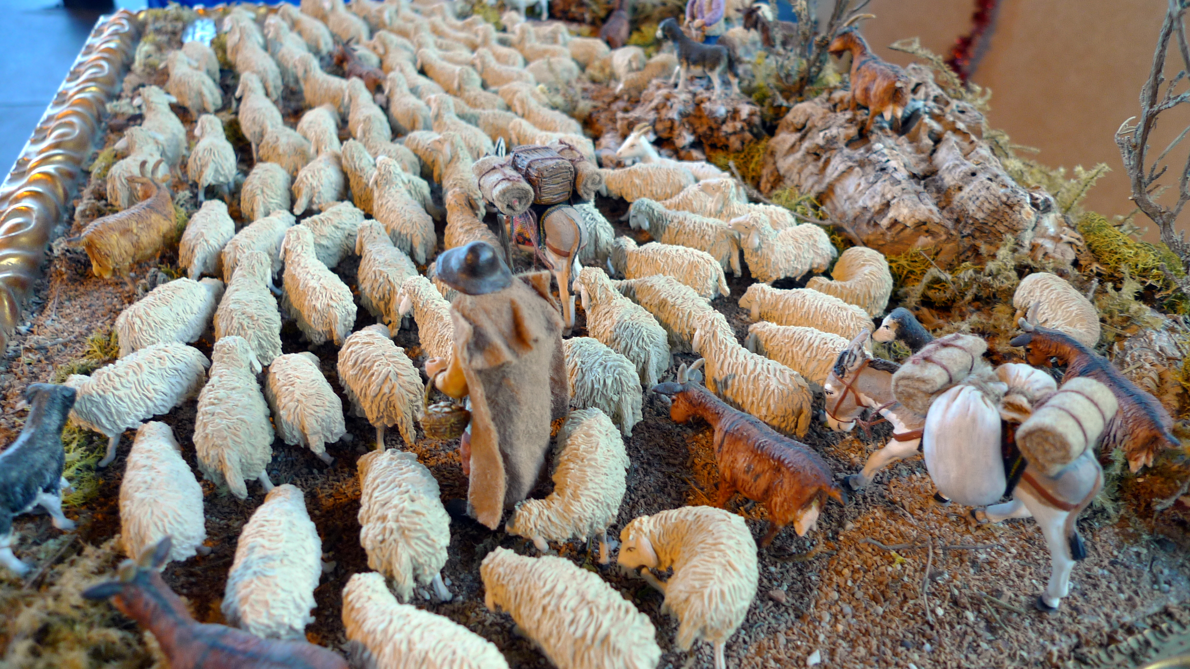 Crèche provençale Berger et son troupeau